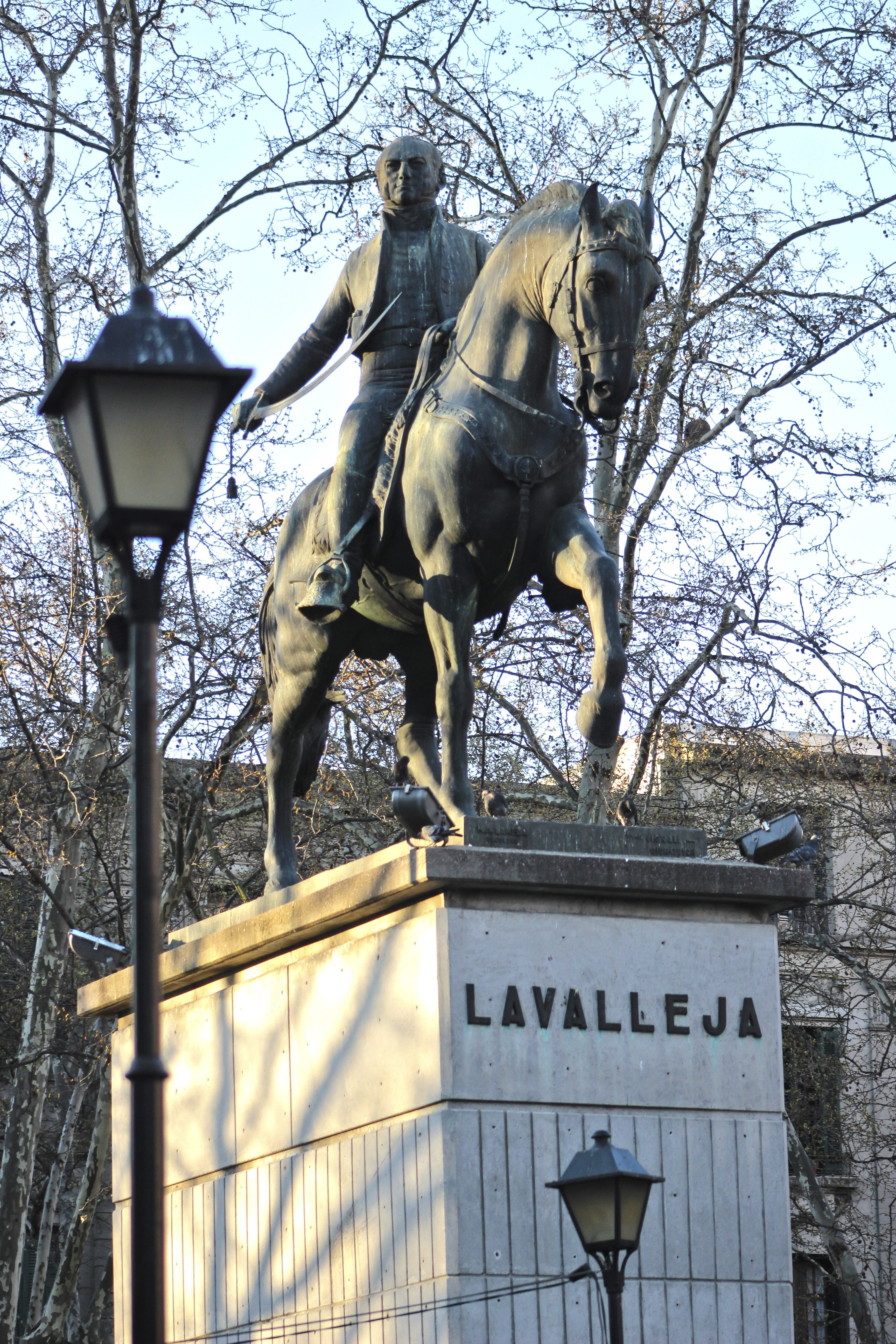 Gral. Juan Antonio Lavalleja. Ubicada en el departamento de Montevideo